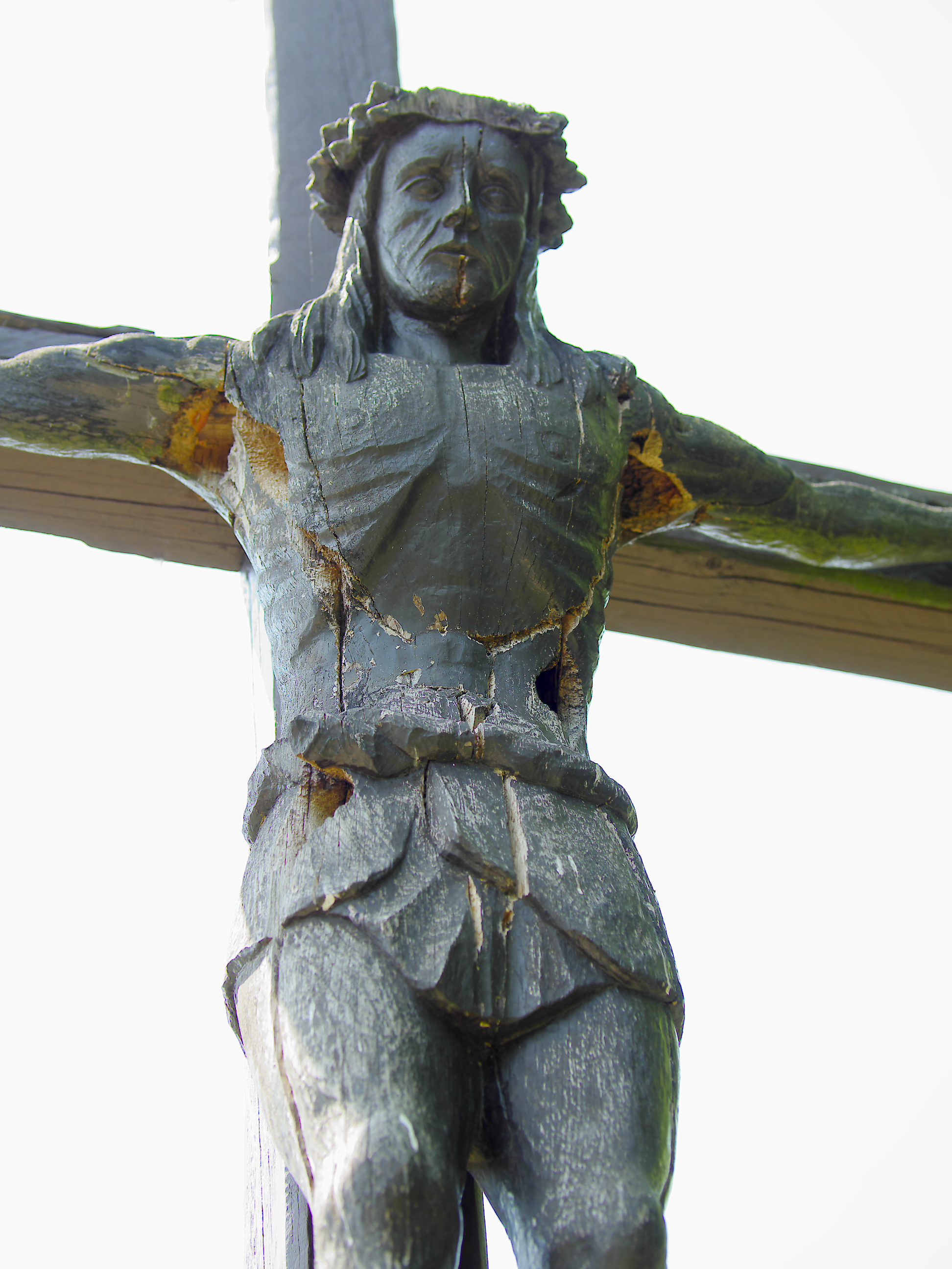 Das Wallfahrtkreuz von Georg Schröter von 1948 auf dem Kreuzweghügel des Klosters Neuzelle